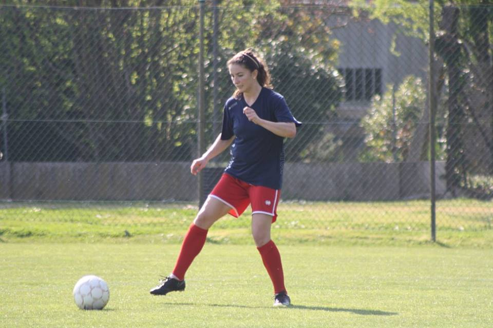 Mariana Díaz Leal Arrillaga durante un allenamento con il San Zaccaria